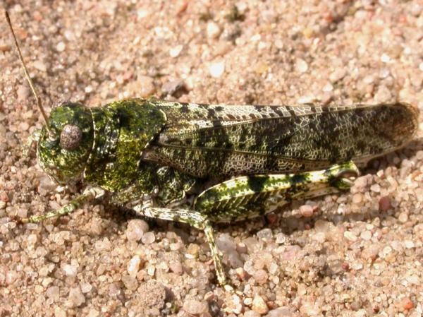 Gefleckte Schnarrschrecke (Bryodemella tuberculata, Fabricius, 1775)